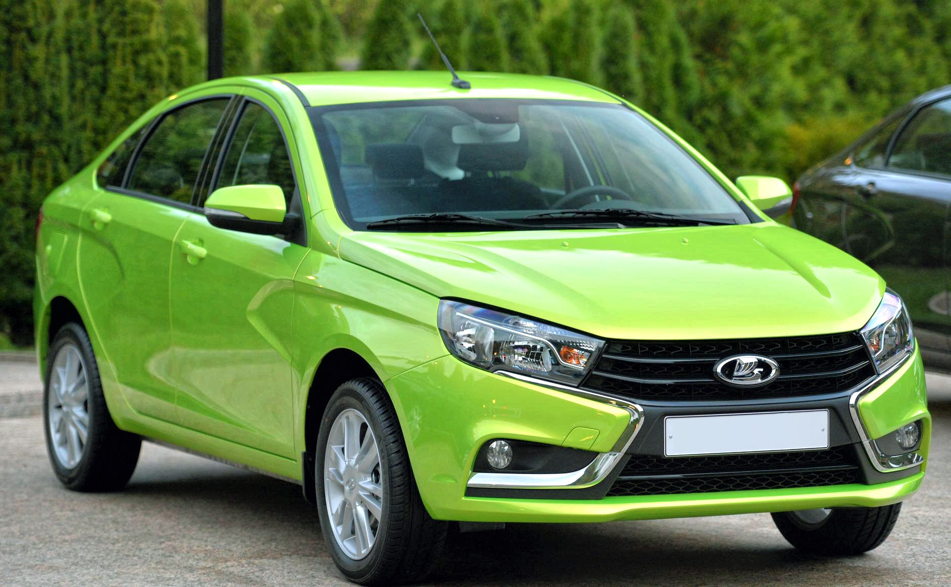 Президент России Владимир Путин тестирует автомобиль «Лада Веста»